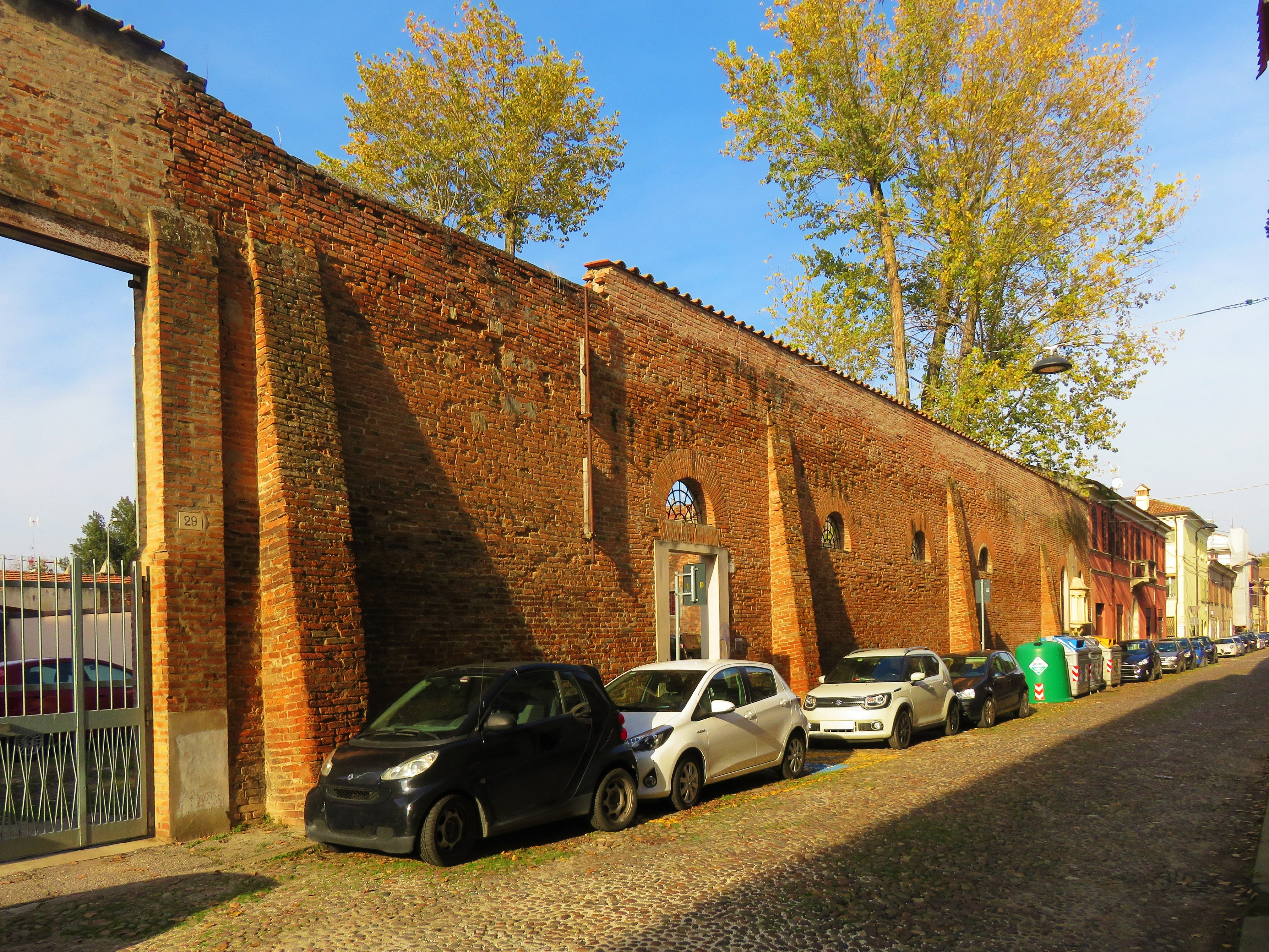 Resti delle mura del monastero di San Guglielmo